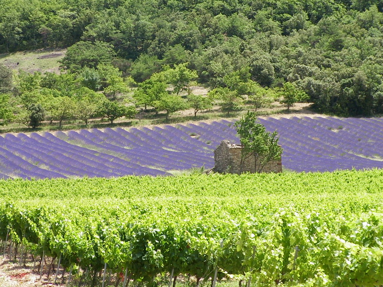 Vignes et lavandes à La Roche-St-Secret-Béconne